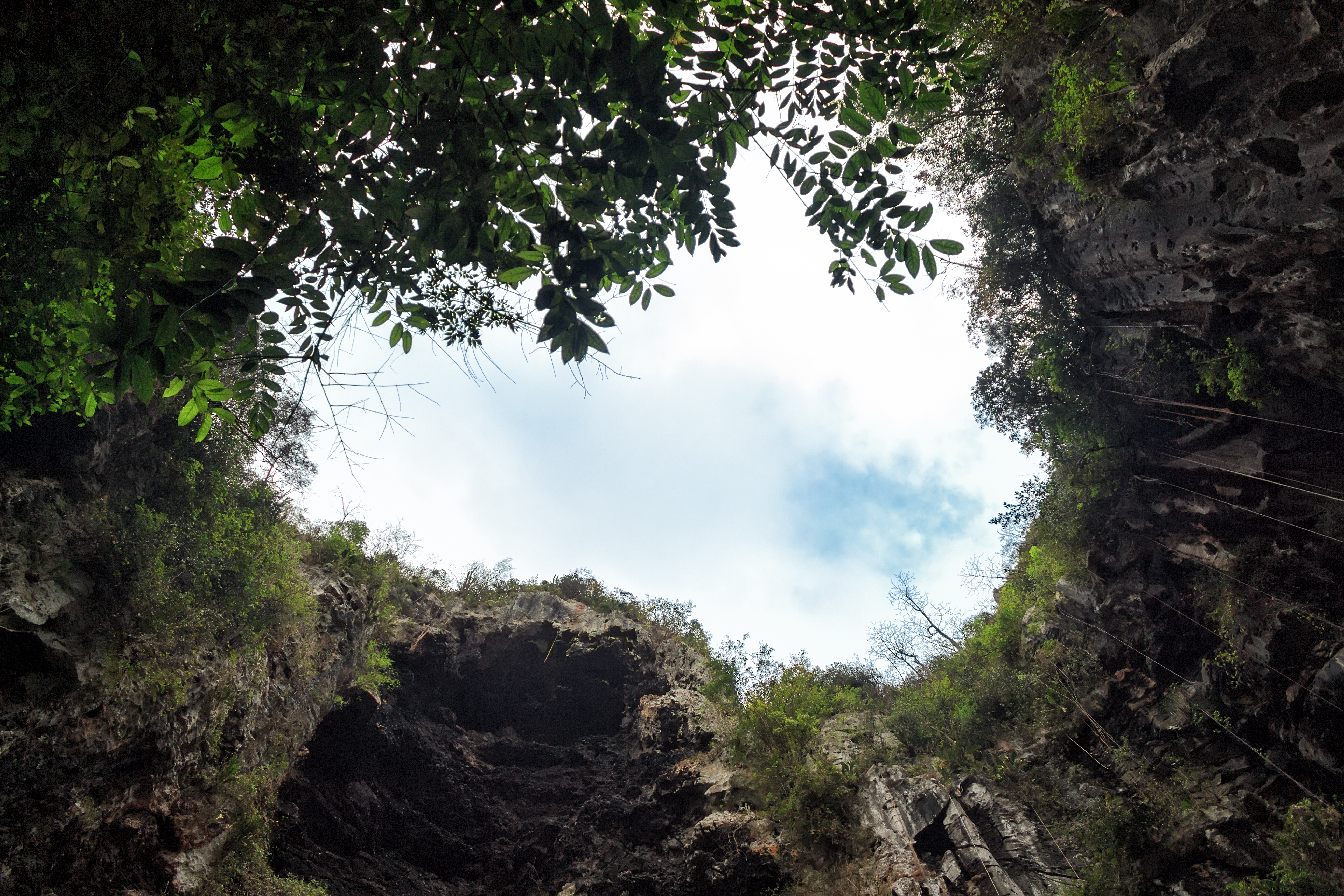 A orillas del Golfete de Cuare, sobre el acantilado del Cerro Chichiriviche se localiza una caverna denominada Cueva del Indio, con petroglifos de más de 3500 años de antigüedad.